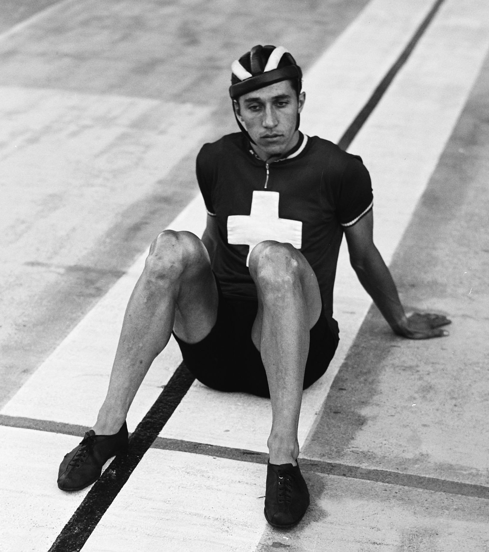 Collectie / Archief : Fotocollectie Anefo Reportage / Serie : [ onbekend ] Beschrijving : Wereldkampioenschappen op de baan Plattner zit op de finish Datum : 29 augustus 1948 Trefwoorden : finishen, wereldkampioenschappen, wielrennen Persoonsnaam : Plattner, Oskar Fotograaf : Noske, J.D. / Anefo Auteursrechthebbende : Nationaal Archief Materiaalsoort : Glasnegatief Nummer archiefinventaris : bekijk toegang 2.24.01.09 Bestanddeelnummer : 902-9490